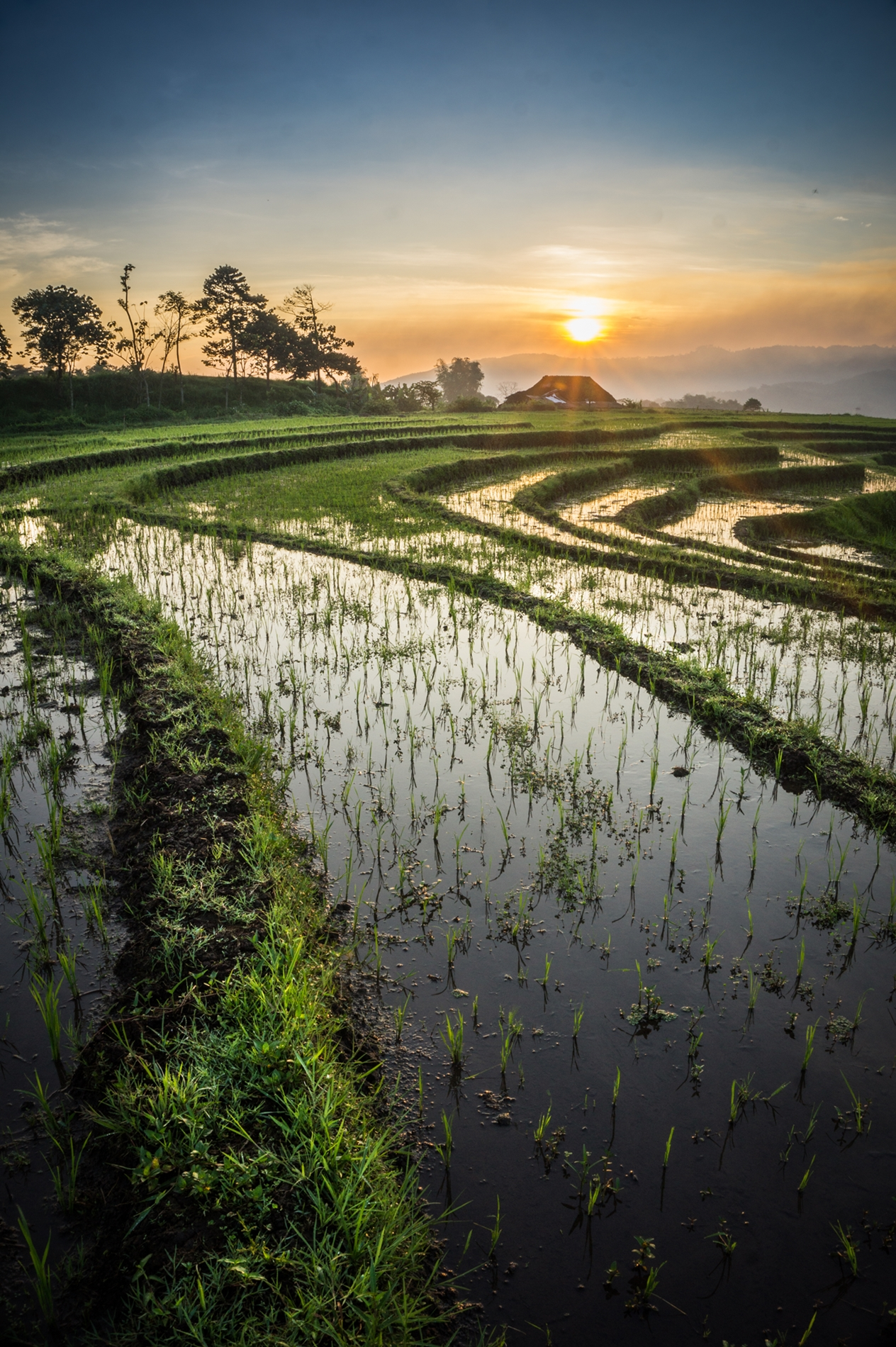 sawah ini terletak di desa sumber ngepoh, di sini terdapat banyak titik sumber mata air yang di gunakan oleh masyarakat sekitar sebagai kebutuhan rumah tangga, mengairi sawah dan sarana rekreasi .Sumber-sumber mata air ini terdapat di bawah bukit yang mengelilingi desa sumber ngepoh Disini pemandangannya memang masih sangat alami. Sebelah kiri sawah, sebelah kanan kolam dan sungai, dan di kelilingi bukit